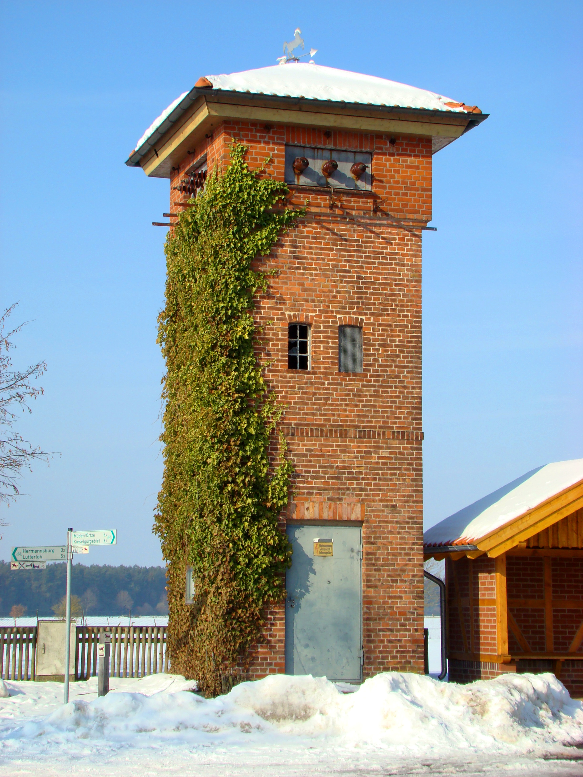 ehemaliges Transformatorenhaus in Weesen (Landkreis Celle)